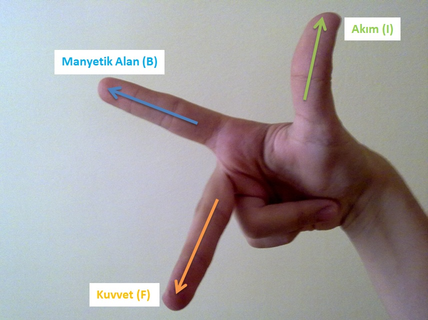 akım taşıyan tele etkiyen manyetik kuvvet